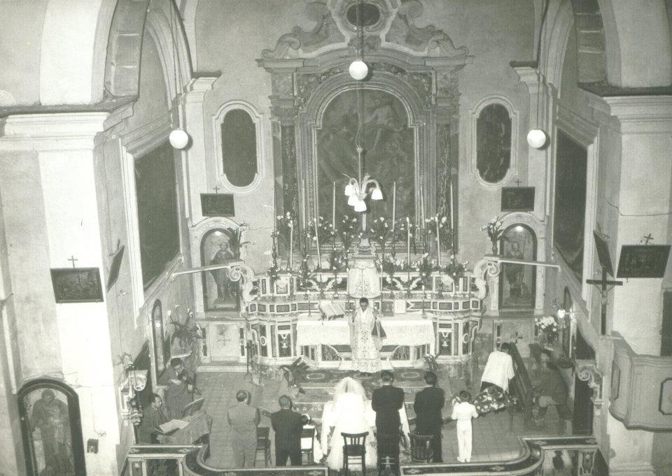 Abside e presbiterio prima dell'ampliamento del 1955-1957.